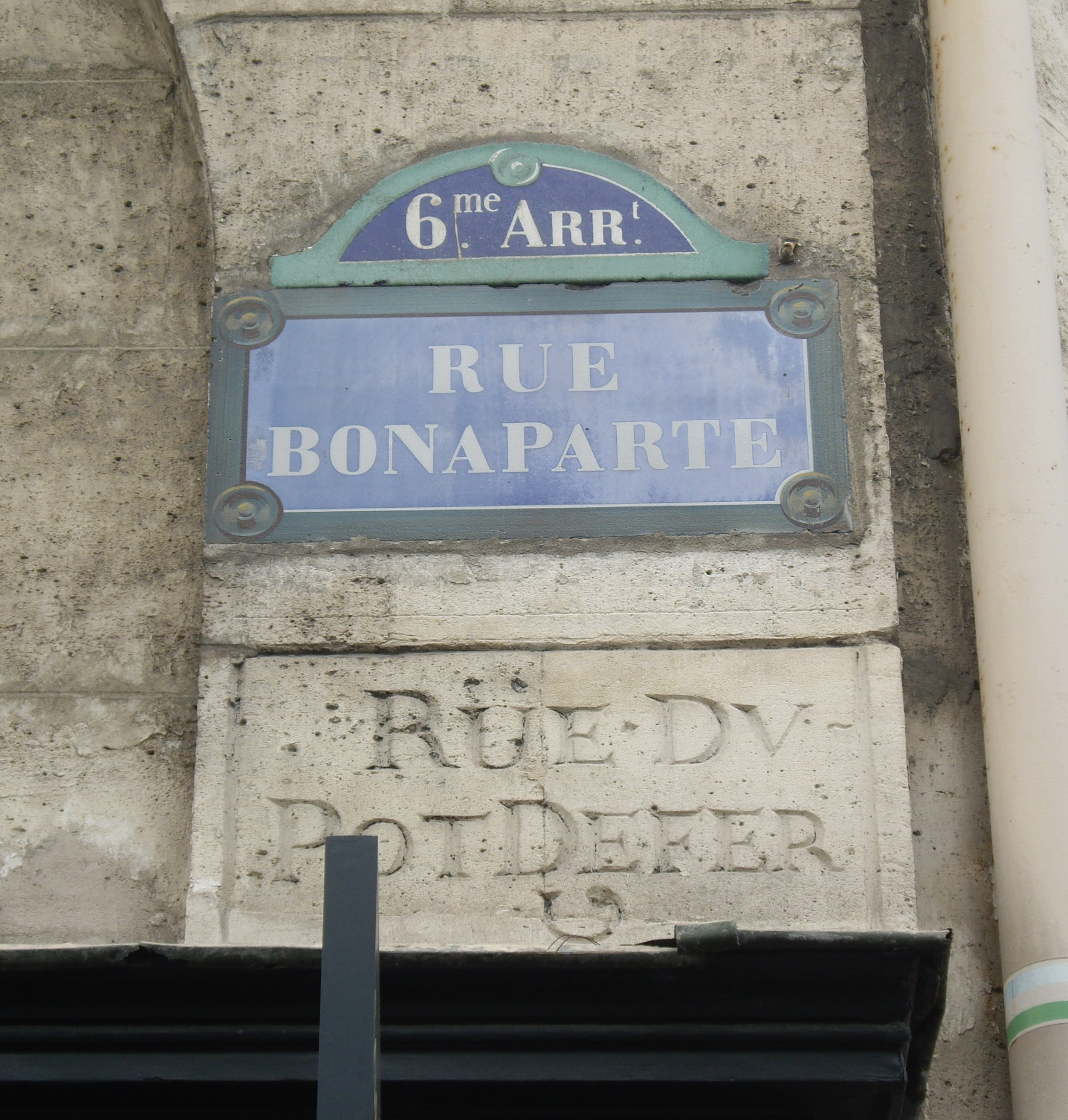 Rue Bonaparte / Rue du Pot-de-Fer. Paris 6e.